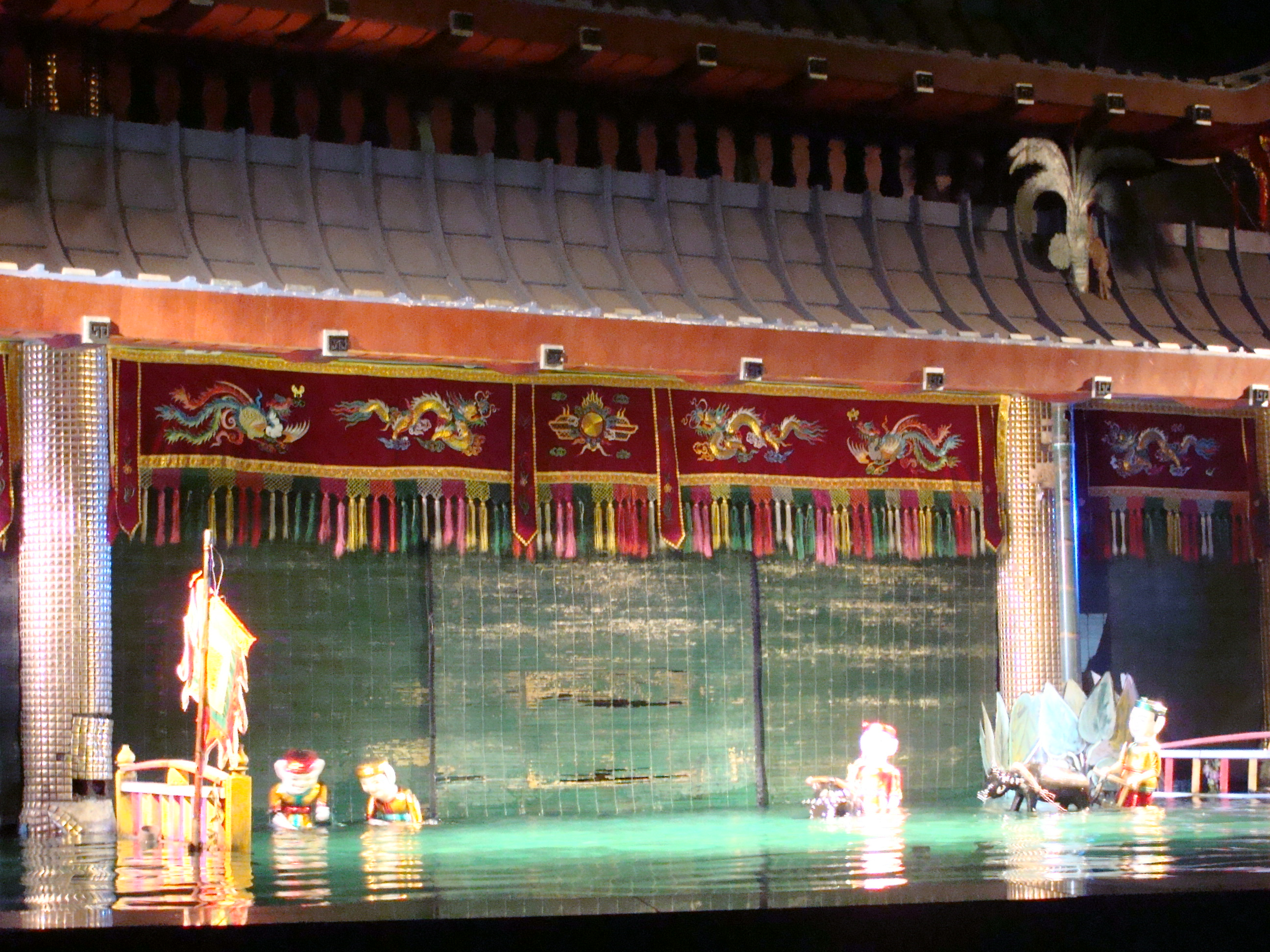 中文（台灣）: 水上木偶秀二